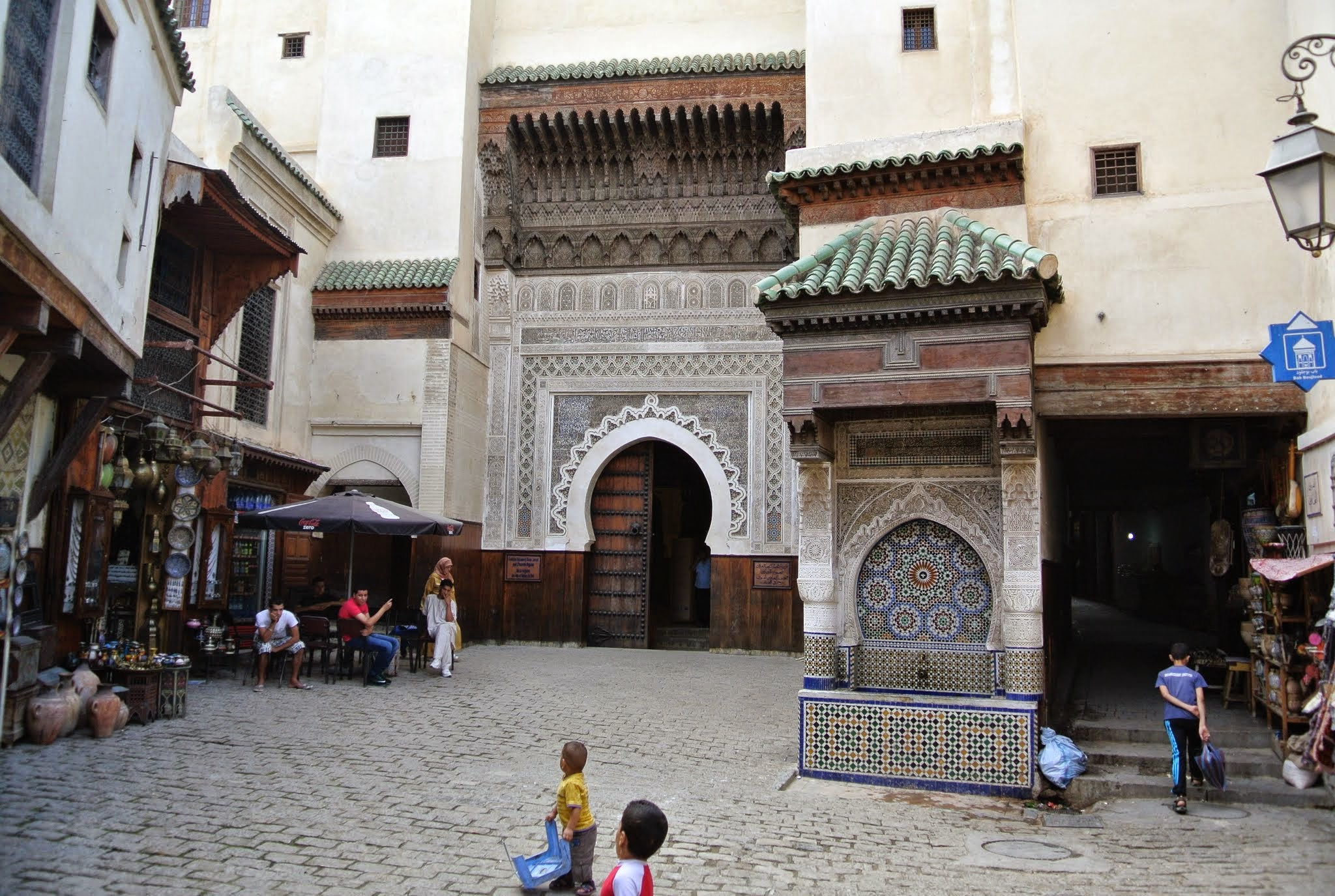 Dar Tazi, Fes, Morocco